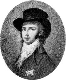 Fürst Anton Radziwill, Antoni Radziwiłł, young